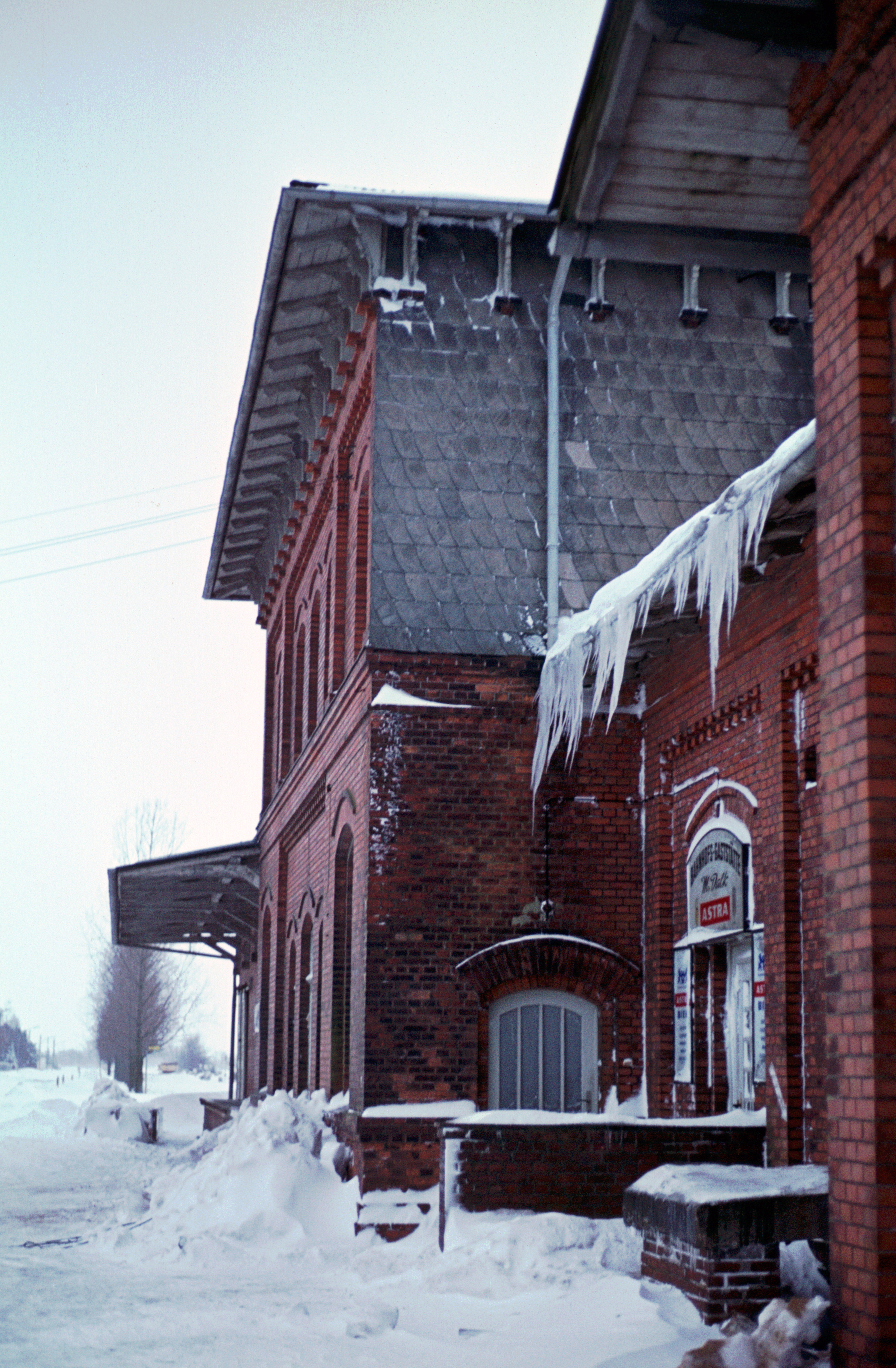 Die Schneekatastrophe in Norddeutschland 1978 legte fast den ganzen Norden in Deutschland lahm. Hier Bilder aus Hohenlockstedt, eingescannt aus alten Dias. Die Farbe ist im Laufe der Jahre verblasst,.